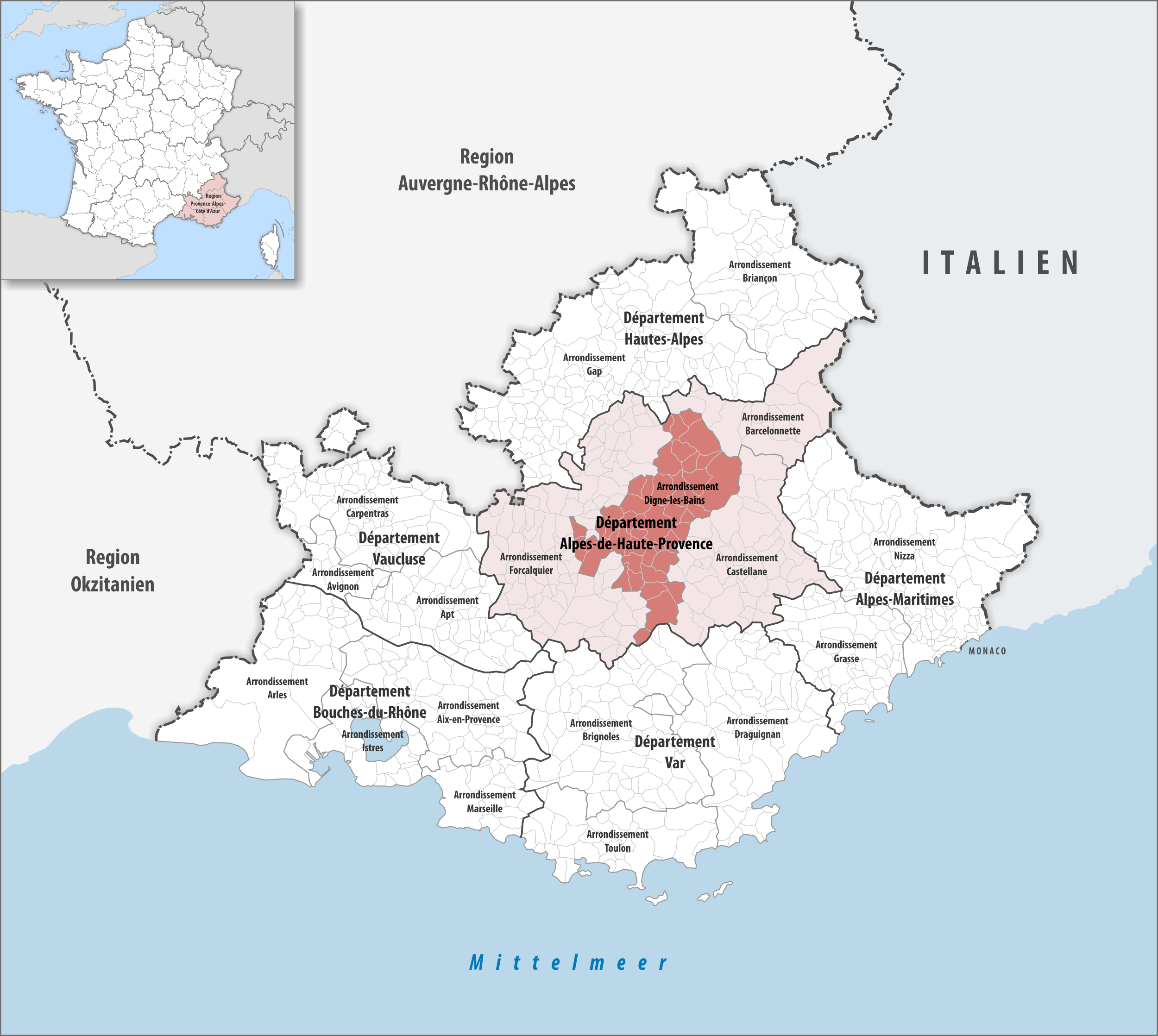 Lage des Arrondissements Digne-les-Bains